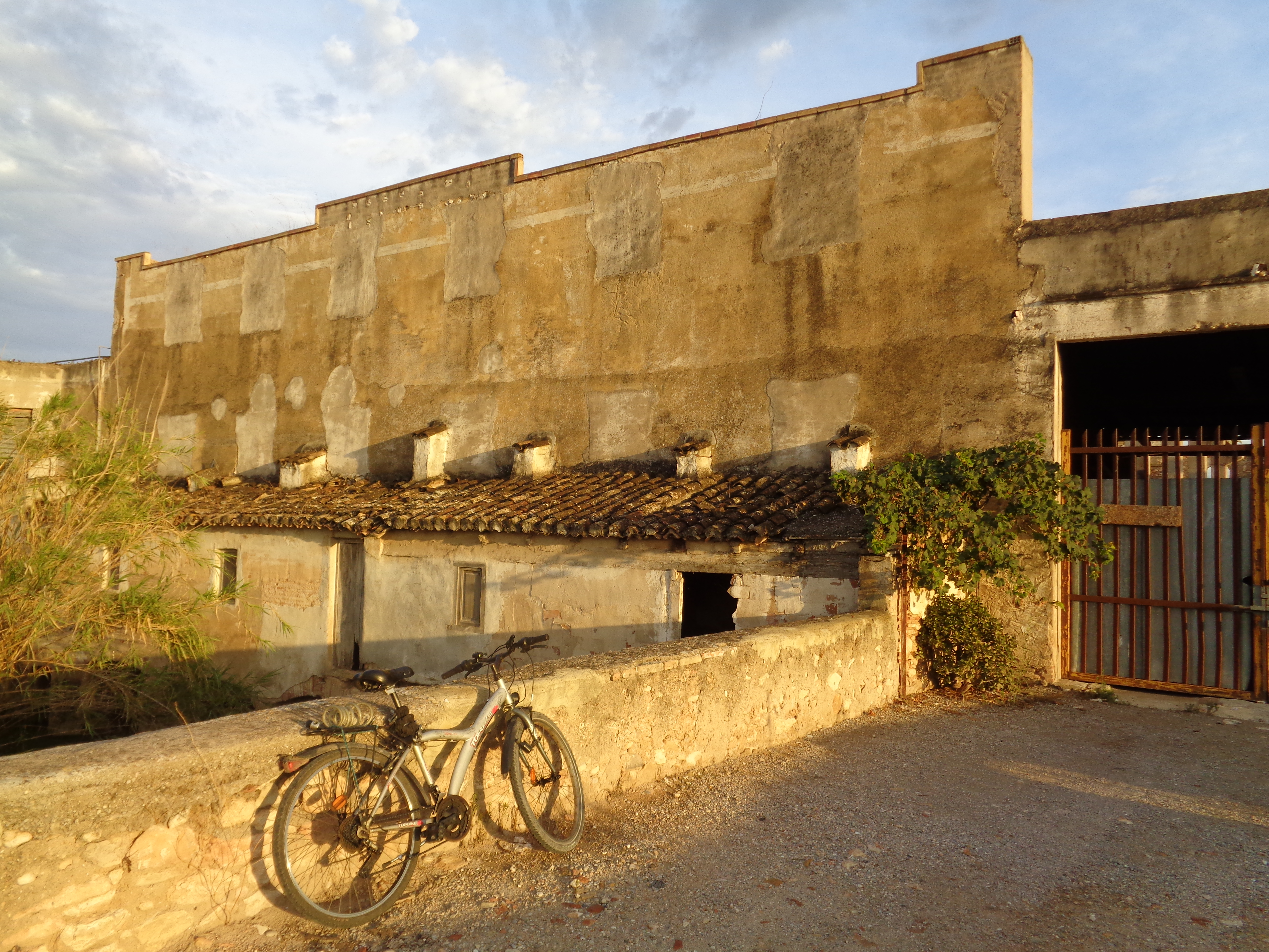 Paterna.